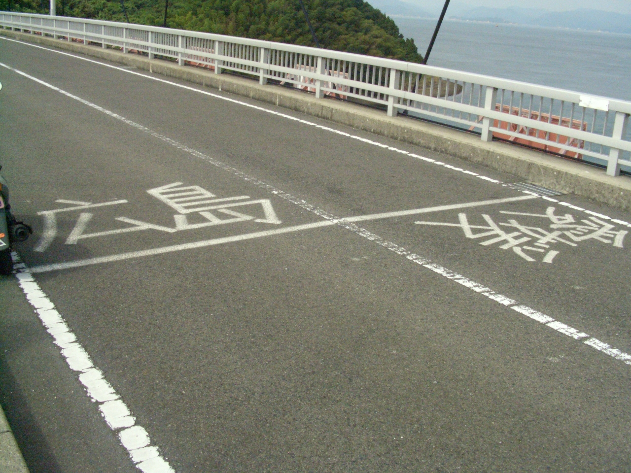 岡村大橋の路面。広島県と愛媛県の県境をなす。